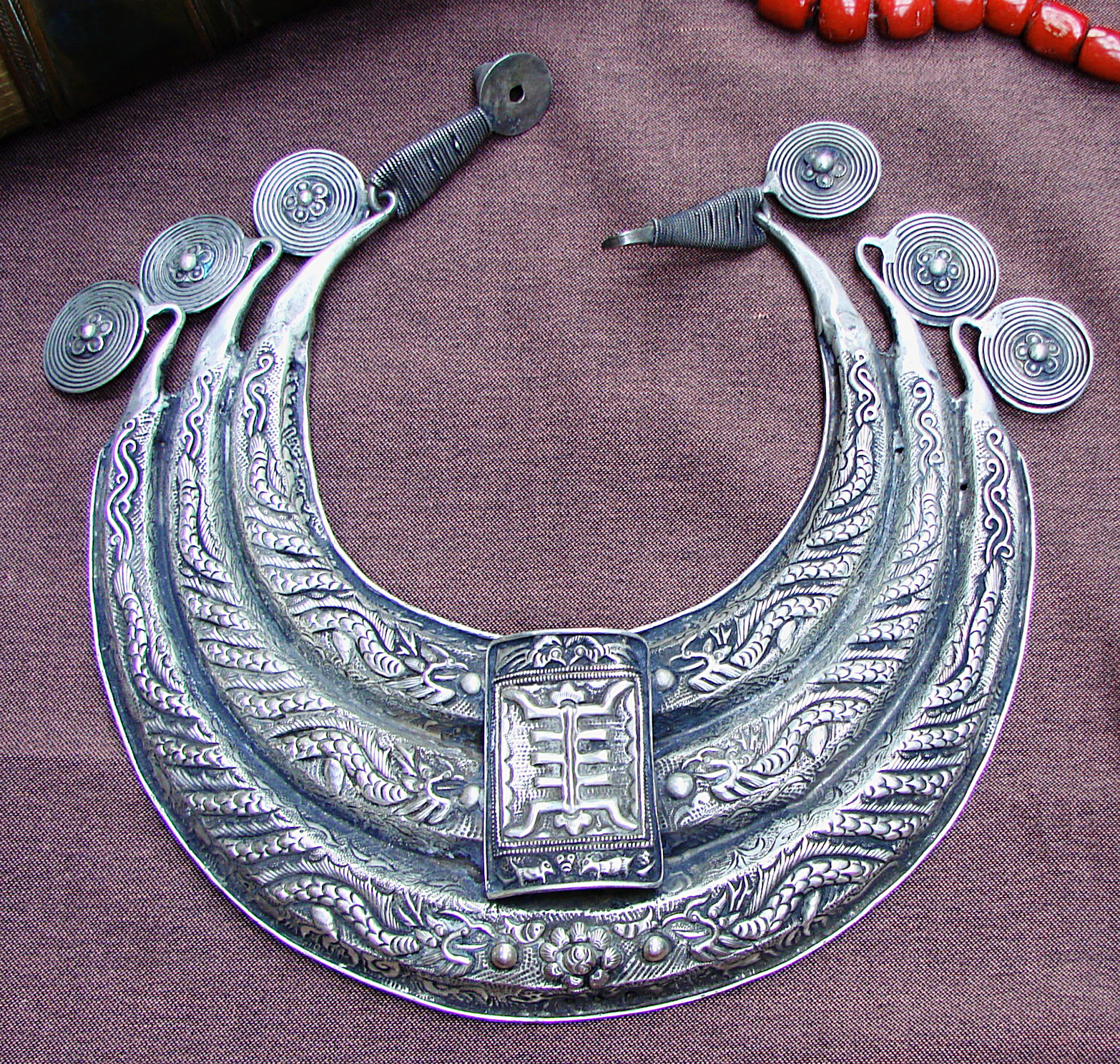 Bijou de l'ethnie Miao (Hmong).